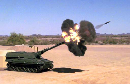 XM2001 Crusader howitzer.